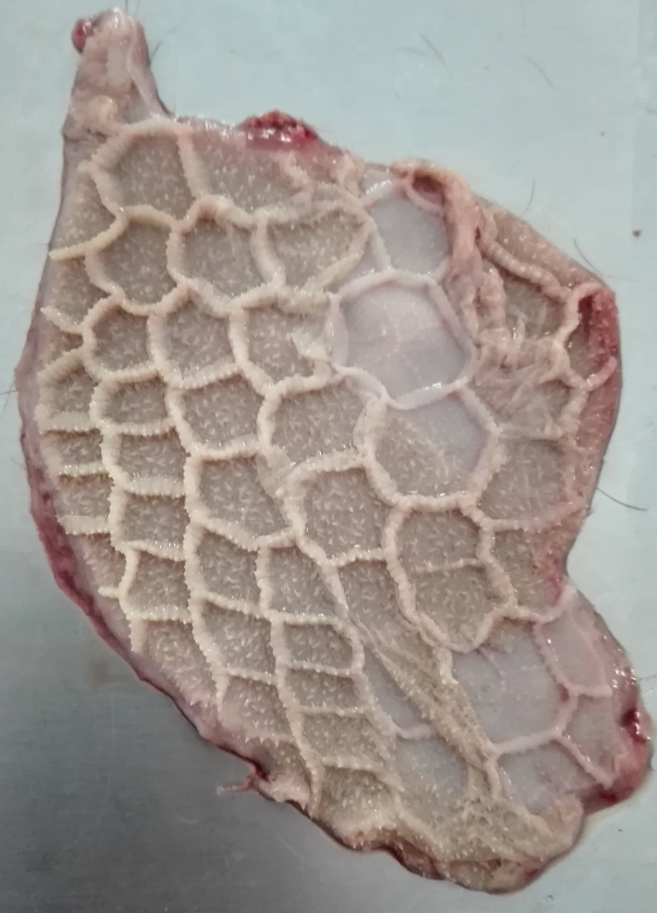 Paroi du réticulum (réseau) d'un impala